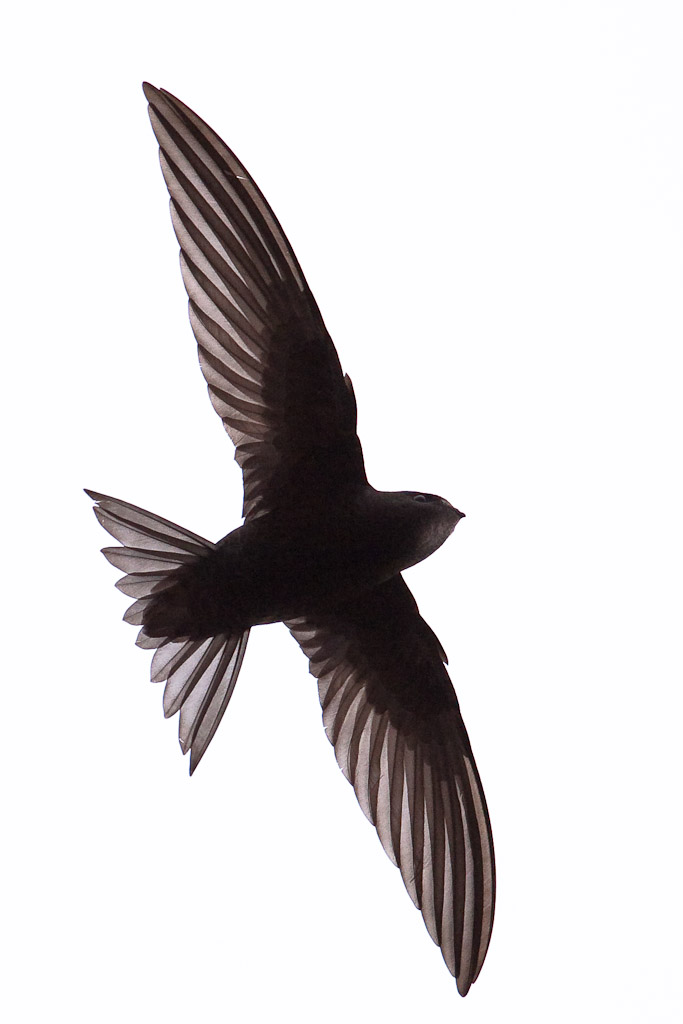 Apus apus, Barcelona, Spain